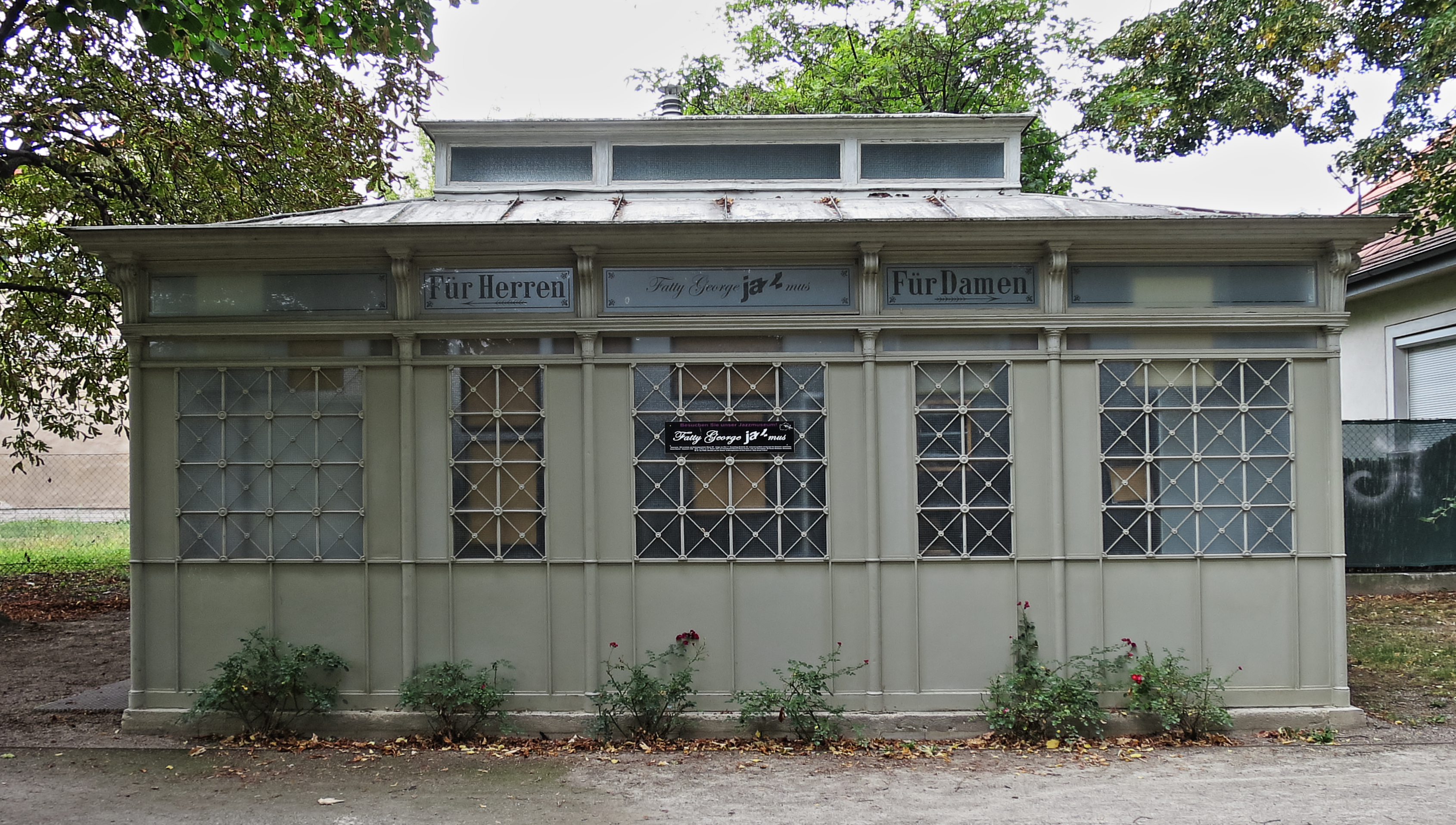 Jazzpark Essling in Wien-Donaustadt, Fatty George Jazzmus (Jazzmuseum)